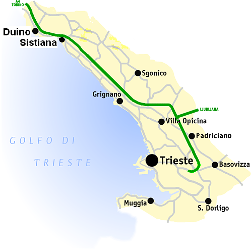 Strade principali nei dintorni di Trieste (Italia) - Trattasi di rielaborazione/correzione/aggiornamento al 2013 del "File: Trieste mappa.PNG" già presente in Wikimedia Commons